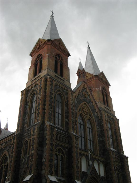 Čedasų Šv. apaštalų Petro ir Povilo bažnyčia